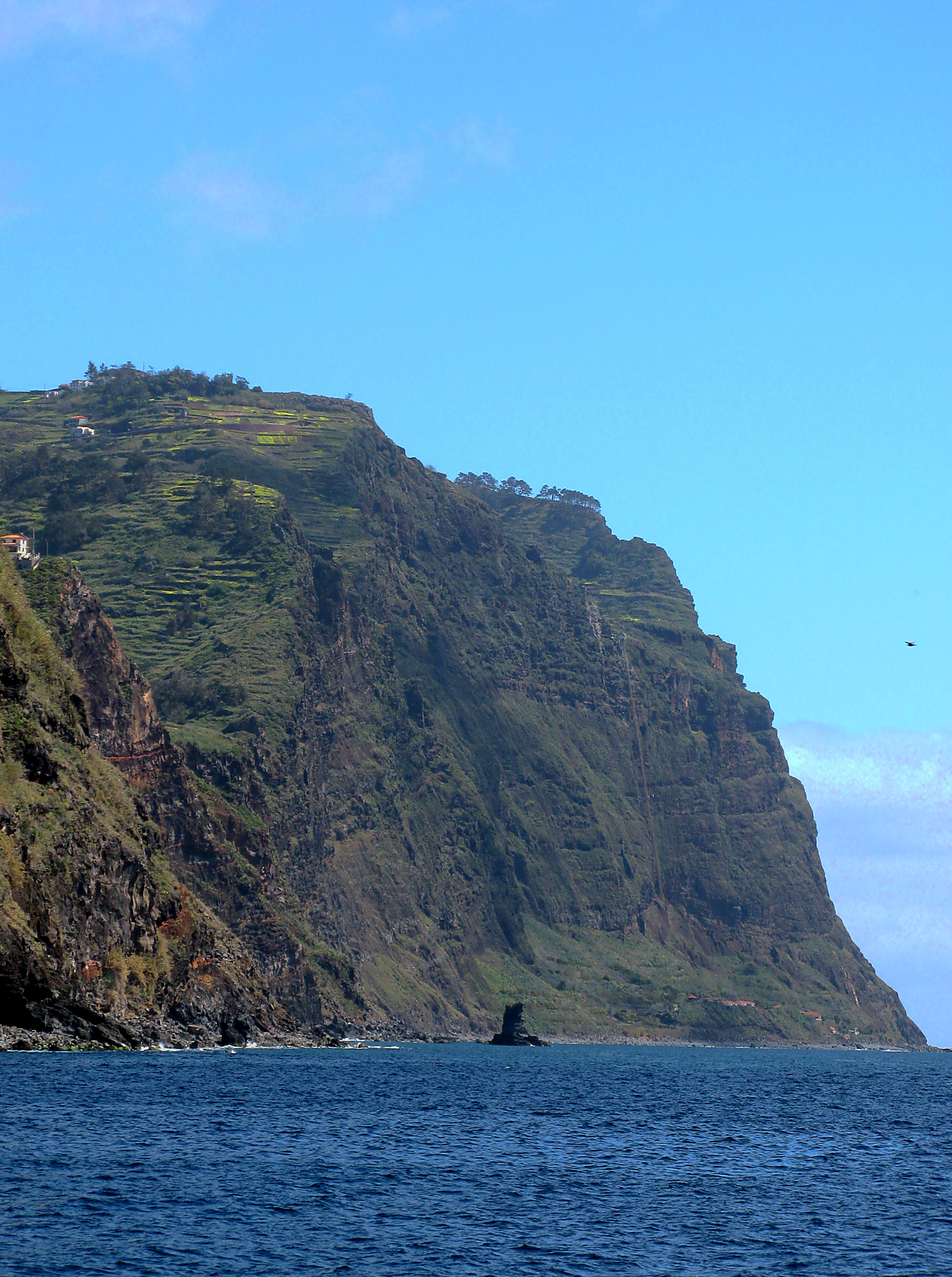 Cabo Girão, Madeira